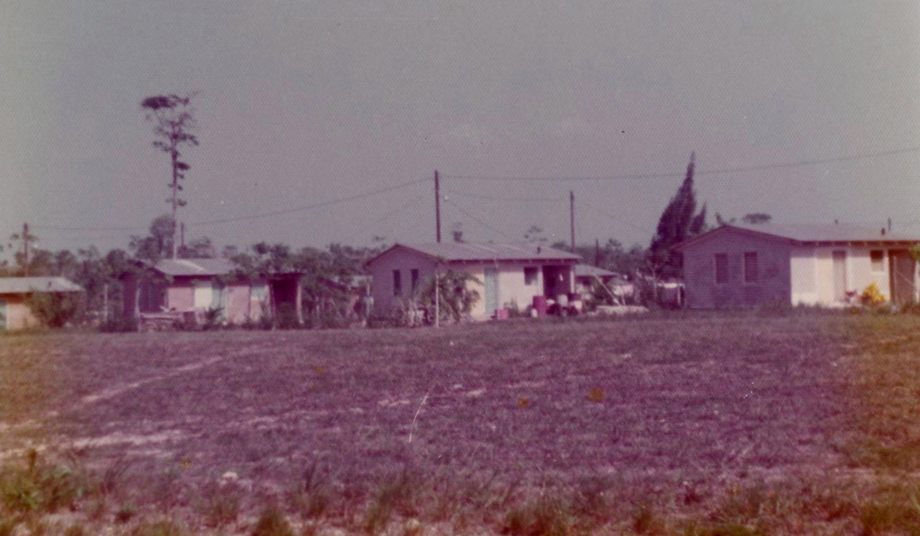 Cement houses in Belmopan, Belize, 1975.